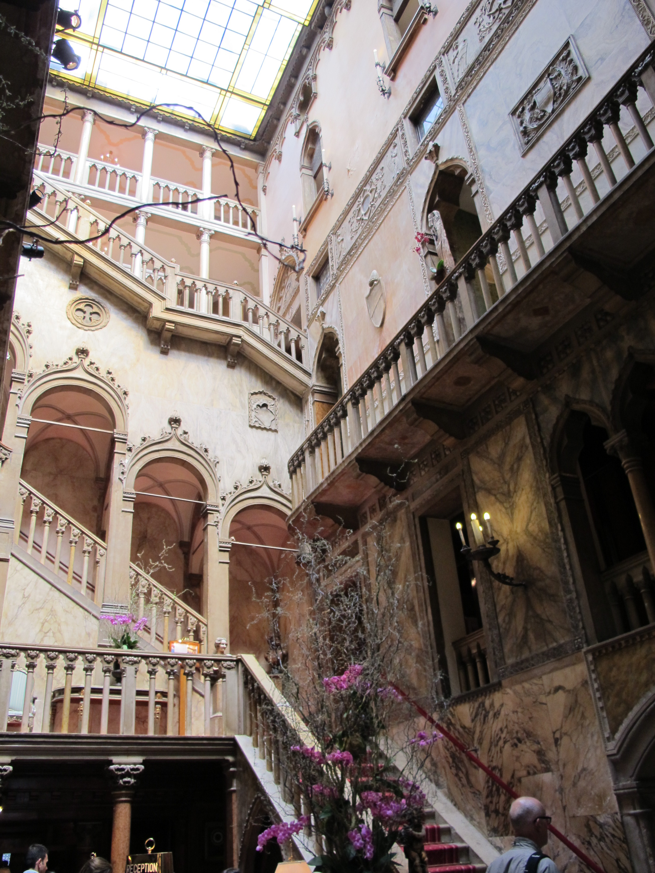 Venezia, danieli, cortile